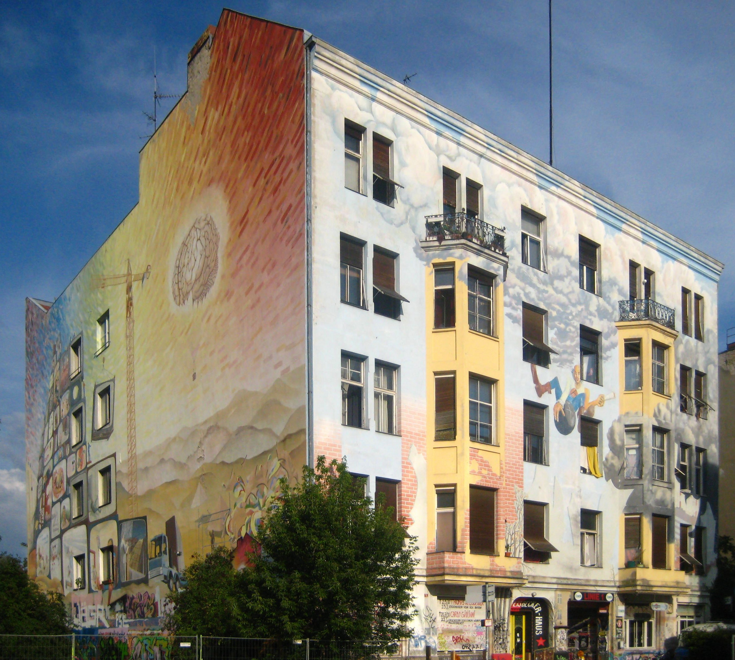 Das Tommy-Weisbecker-Haus in der Wilhelmstraße 9 in Berlin-Kreuzberg. Das "selbstverwaltete Wohnkollektiv" mit dem Schwerpunkt der Hilfe für Jugendliche und junge Erwachsene ist benannt nach dem 1972 bei einem Festnahmeversuch von der Polizei erschossenen Thomas Weisbecker, einem Terroristen der Bewegung 2. Juni. Es existiert seit 1973. Im Haus befinden sich das linke Szene-Cafe "Linie 1" und der Veranstaltungsort "Schicksaal".